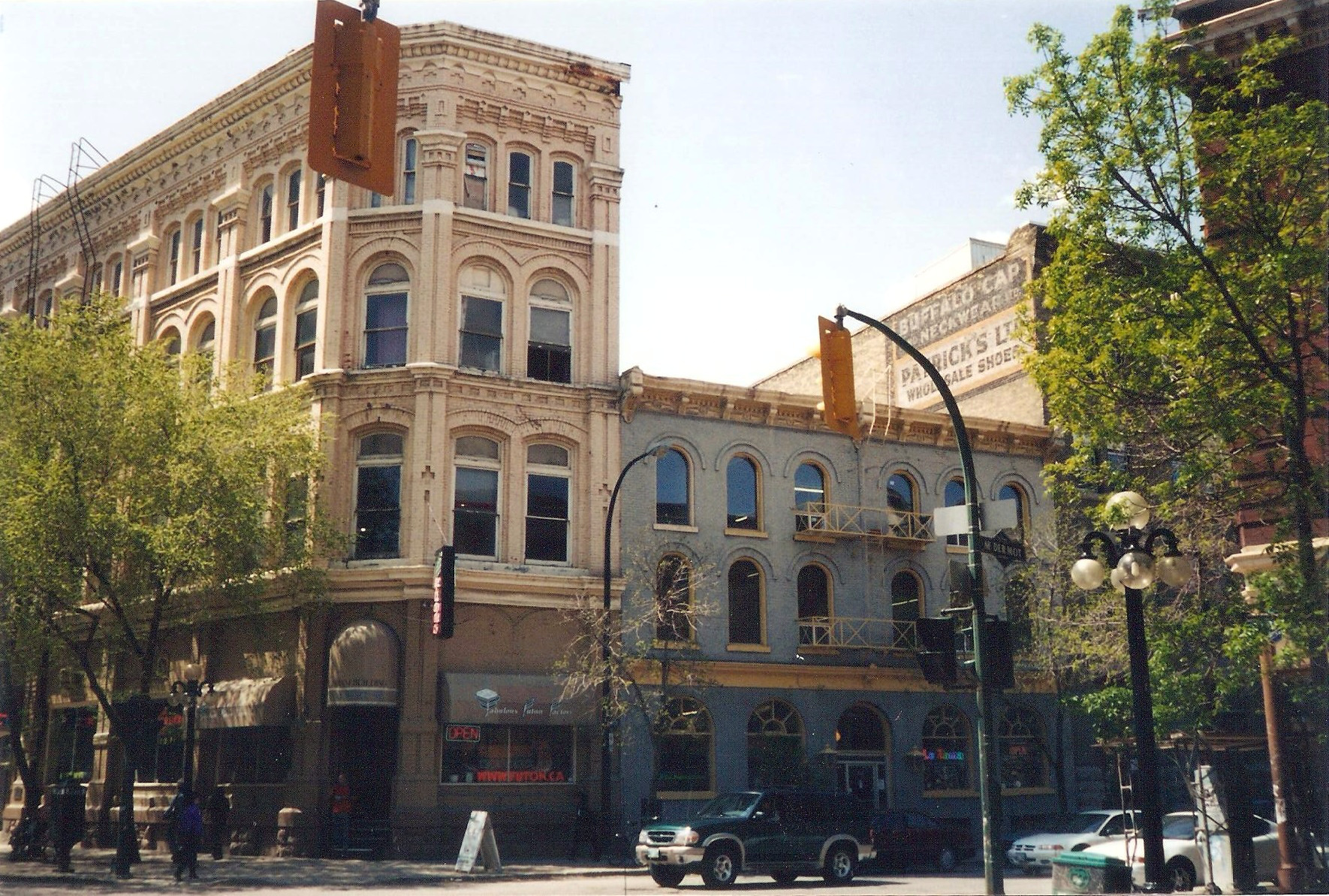 Winnipeg, Telegram Building, 1882